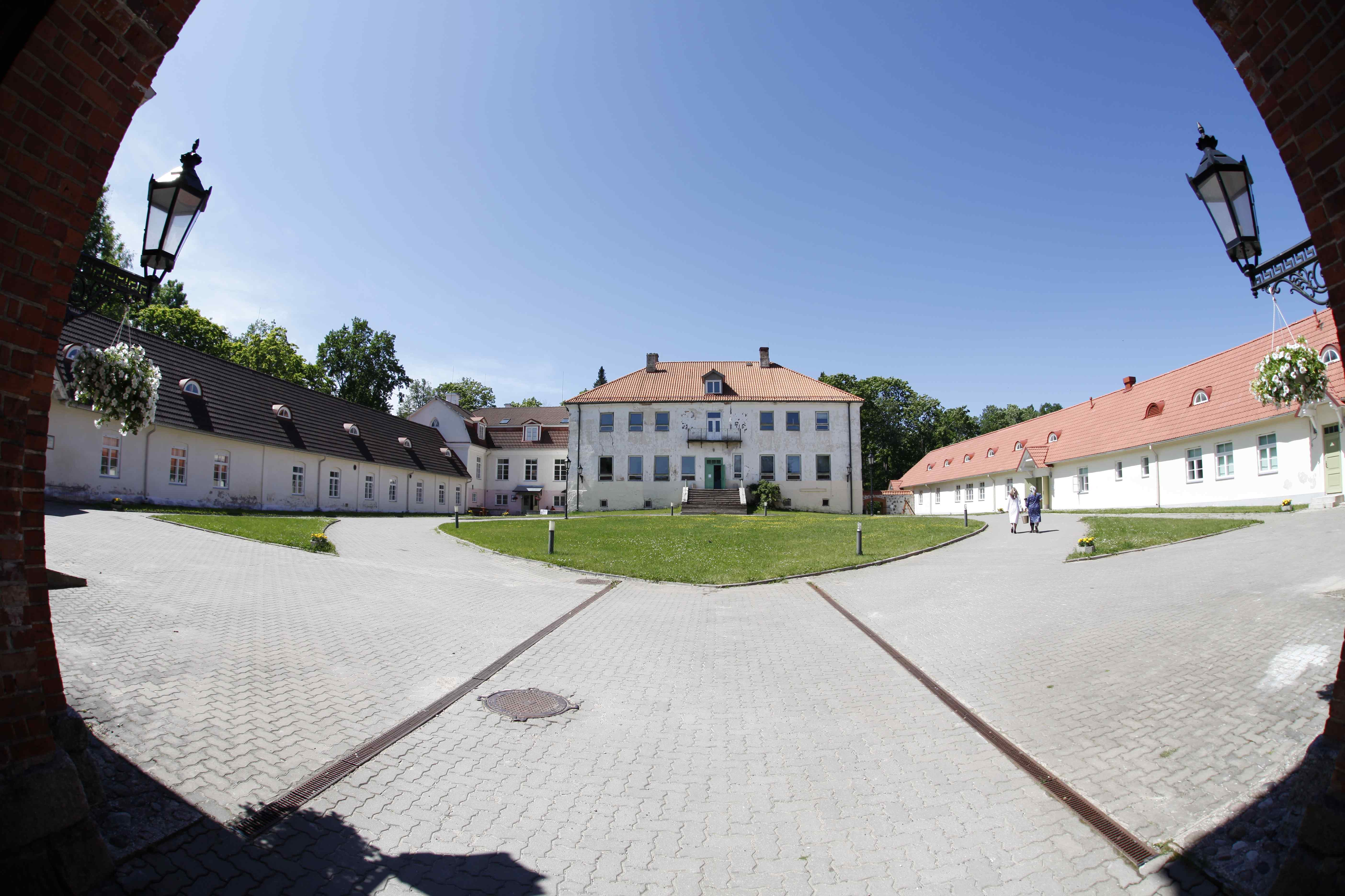 Rogosi mõisa peahoone tiibhoonetega